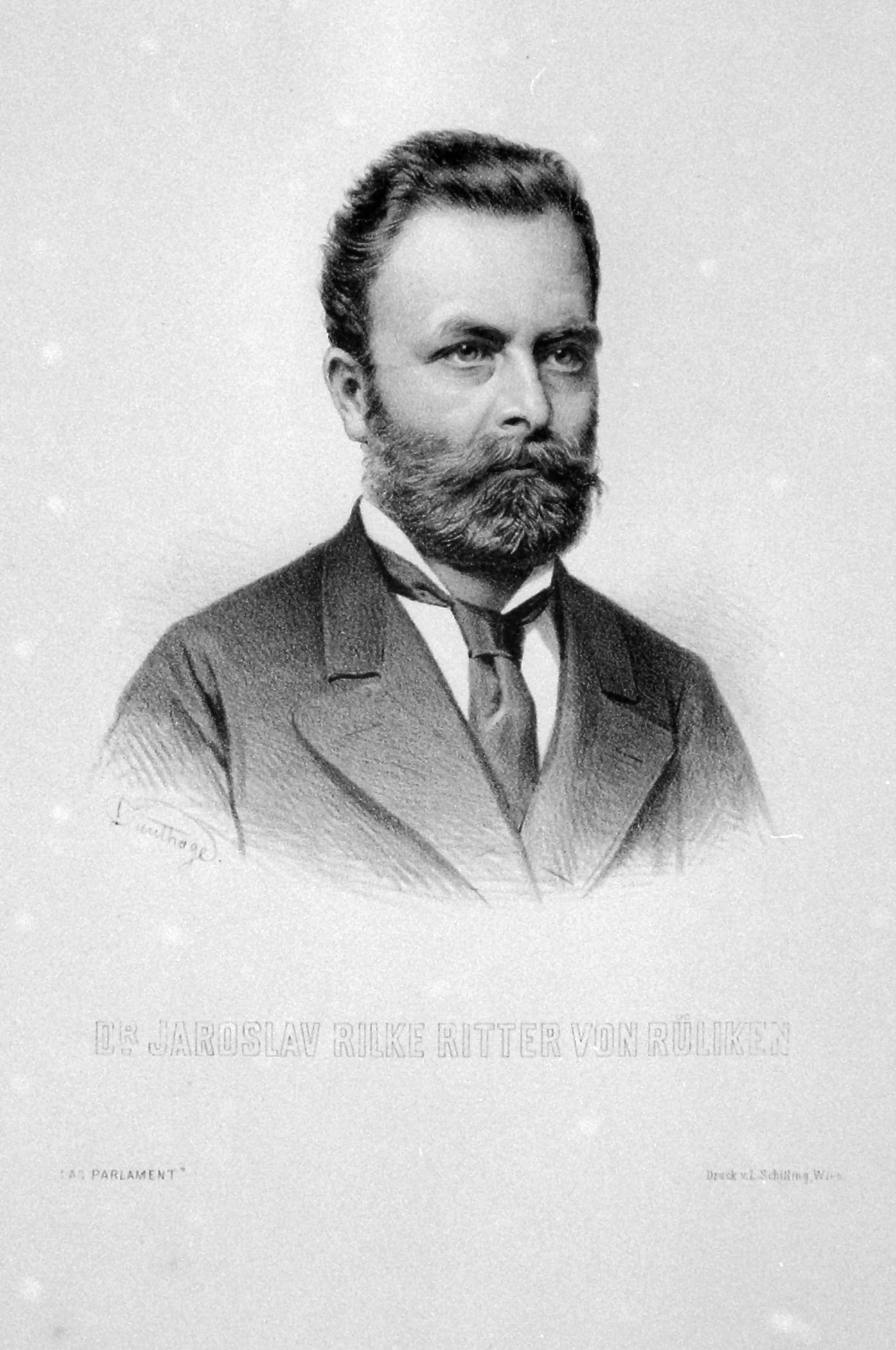 Jaroslav Rilke von Rüliken (1835-1892), Politiker, Rechtsanwalt. Onkel des Dichters R: Abgeordneter zum böhmischen Landtag. Lithographie von Adolf Dauthage, 1880